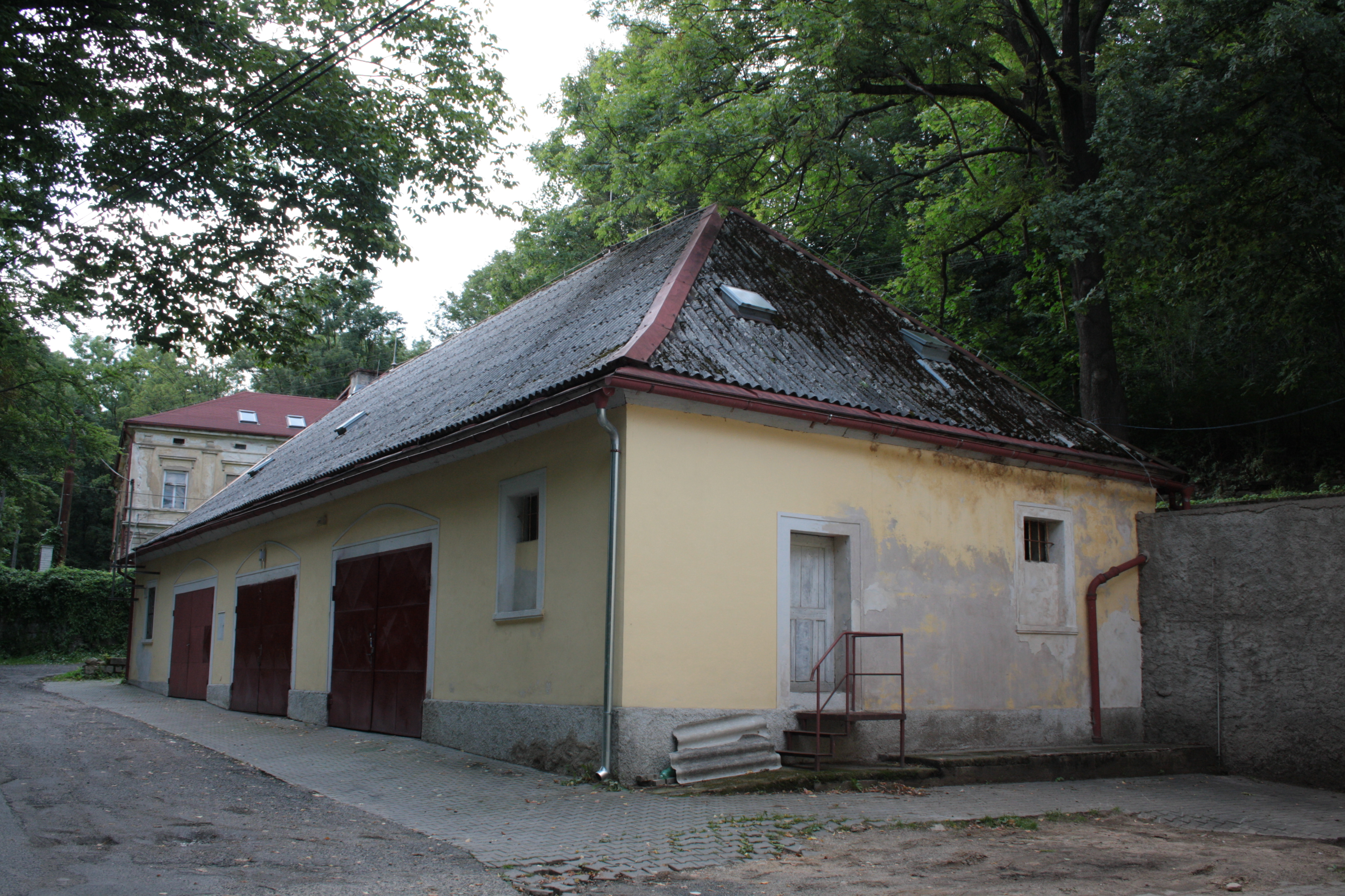 Garáže severozápadně od zámku v Lázních Libverdě.